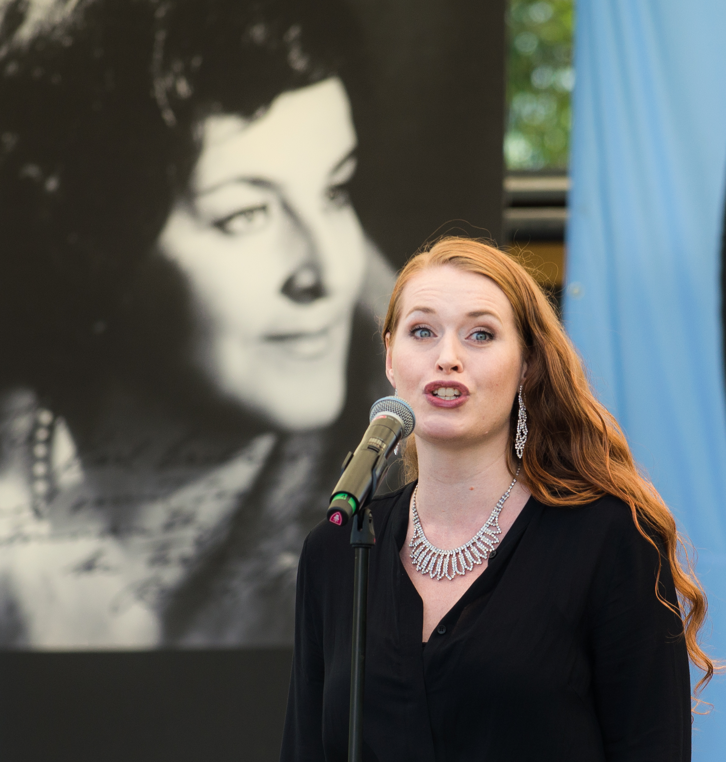 Cornelia Beskow under en gratiskonsert i Kungsträdgården i Stockholm för Jussi Björlingsällskapet den 1 augusti 2016.